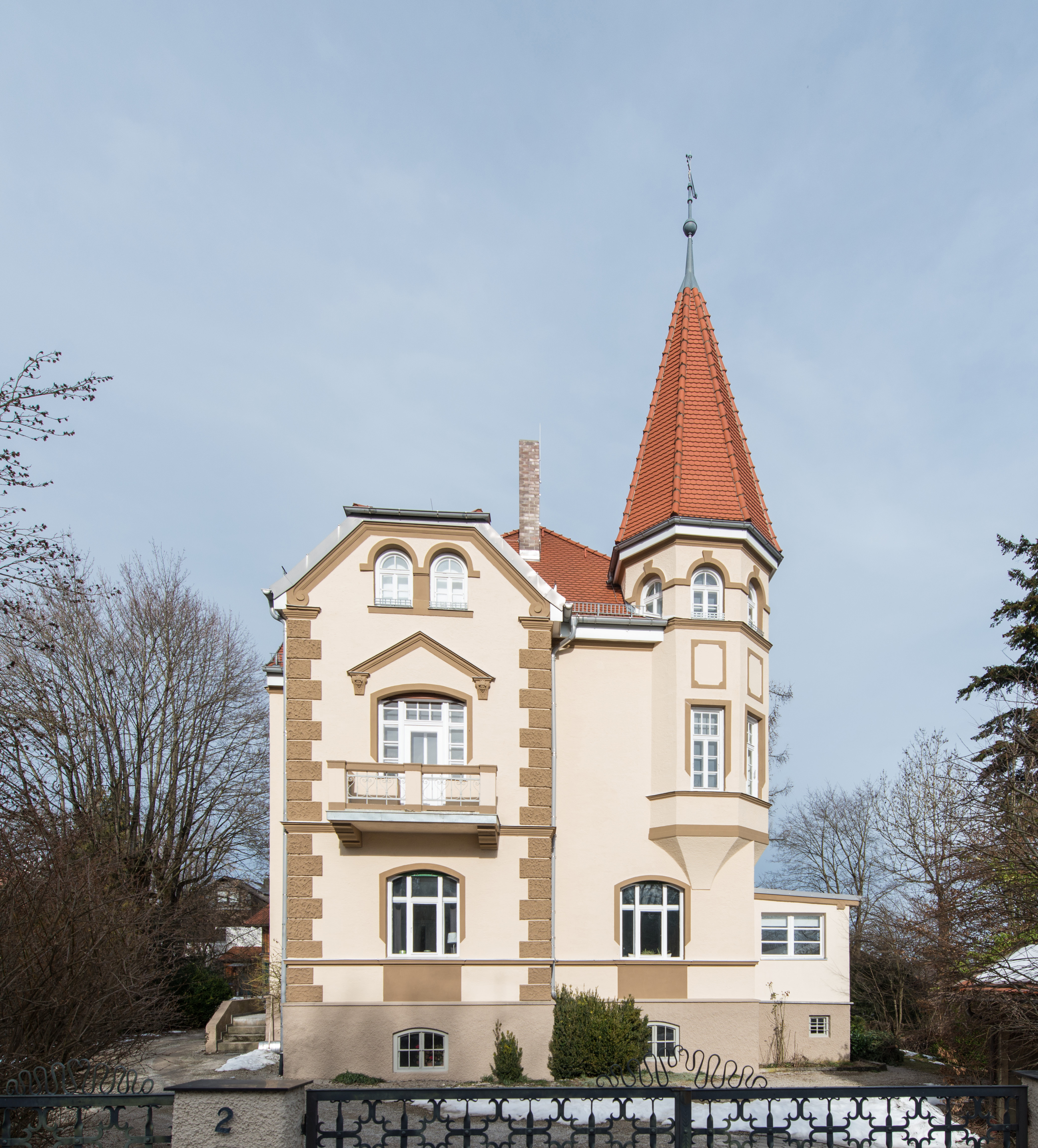 Denkmalgeschütztes Gebäude in Stockdorf